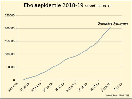 Diagramm zu Impfungen gegen Ebola im Epidemiegebiet des Ostkongo; Daten: Communiques de presse, Ministre de la Santé Dr. Oly Ilunga Kalenga; Actualité de la riposte